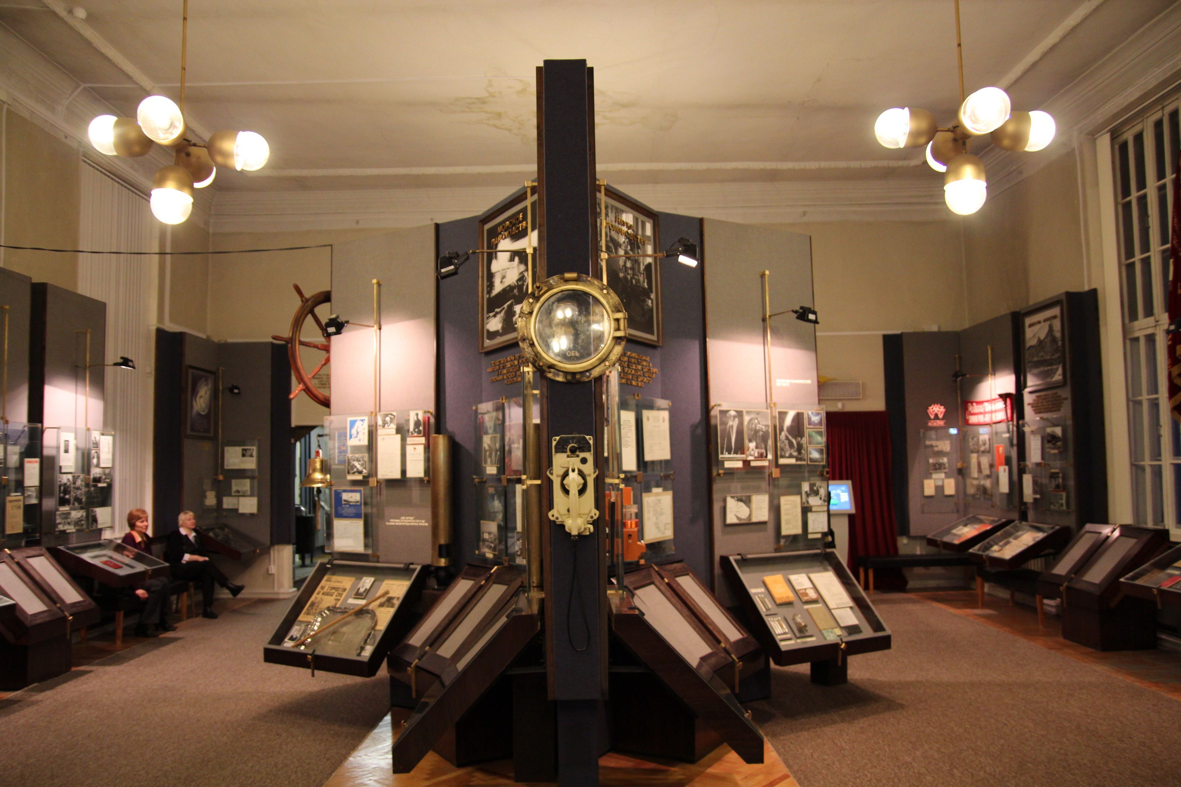 Краеведческий музей Мурманска (зал Мурманская область в 1960—85-е годы)